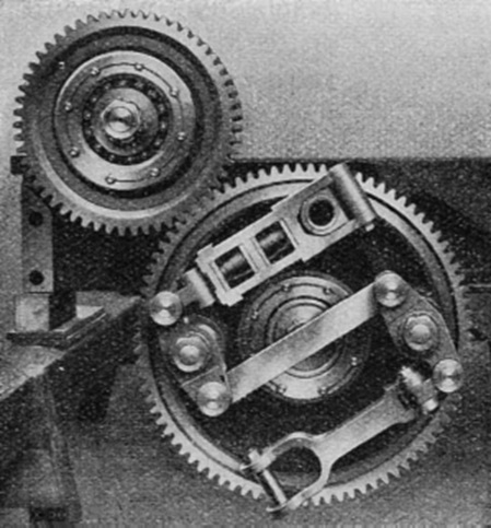 Geöffneter Tschanz-Antrieb des Triebwagens BCe 2/5 der Burgdorf-Thun-Bahn (BTB)